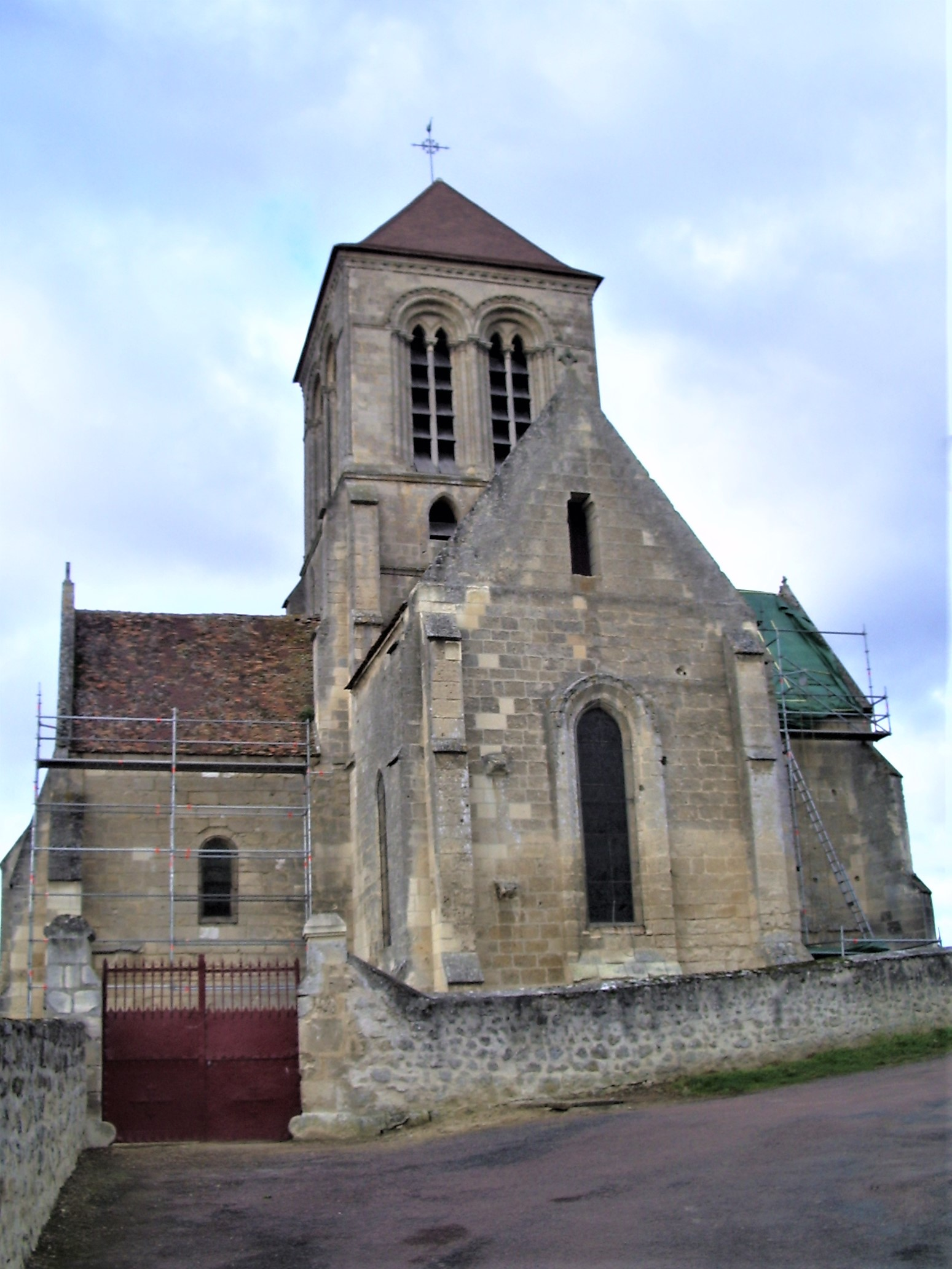 Romanische Dorfkirche von Paars, bei Braine (südlich von Laon, westlich von Reims).